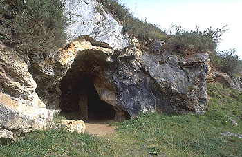 Arte parietal del Paleolítico superior. Cueva La Pasiega en el monte Castillo.